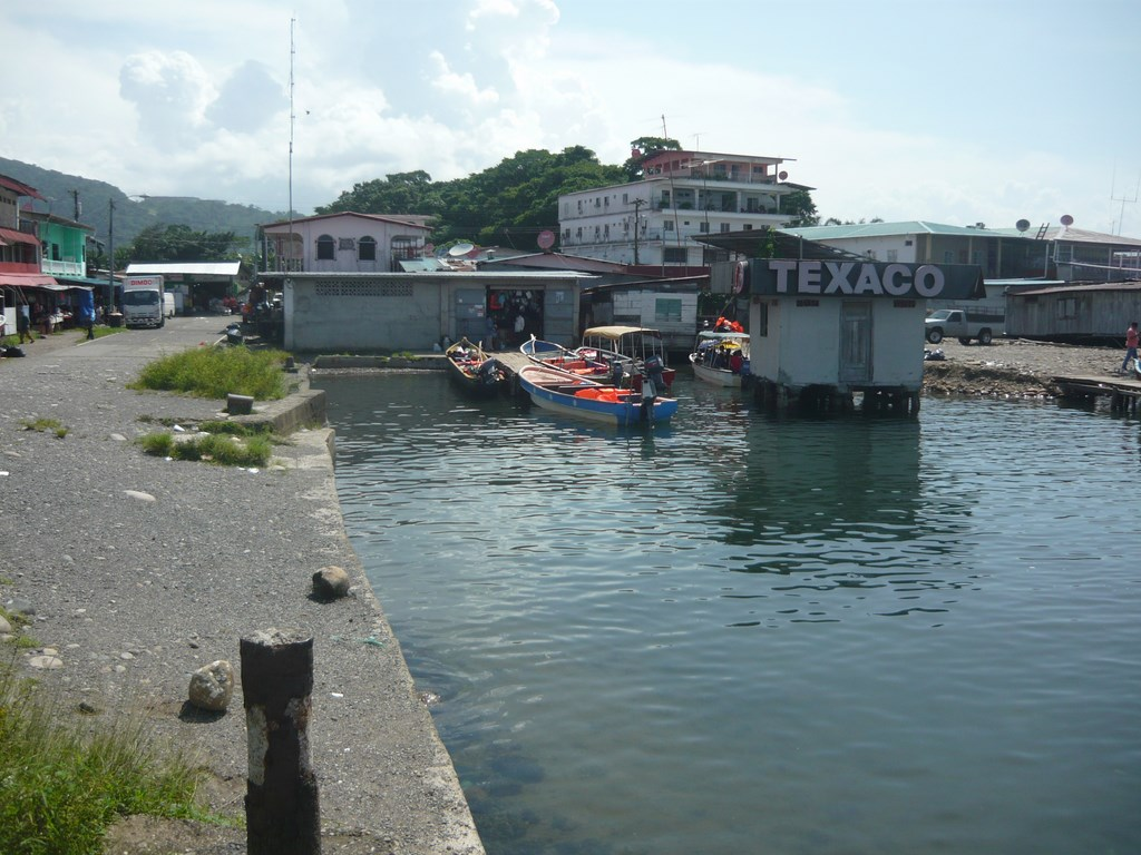 Puerto de Chiriquí Grande